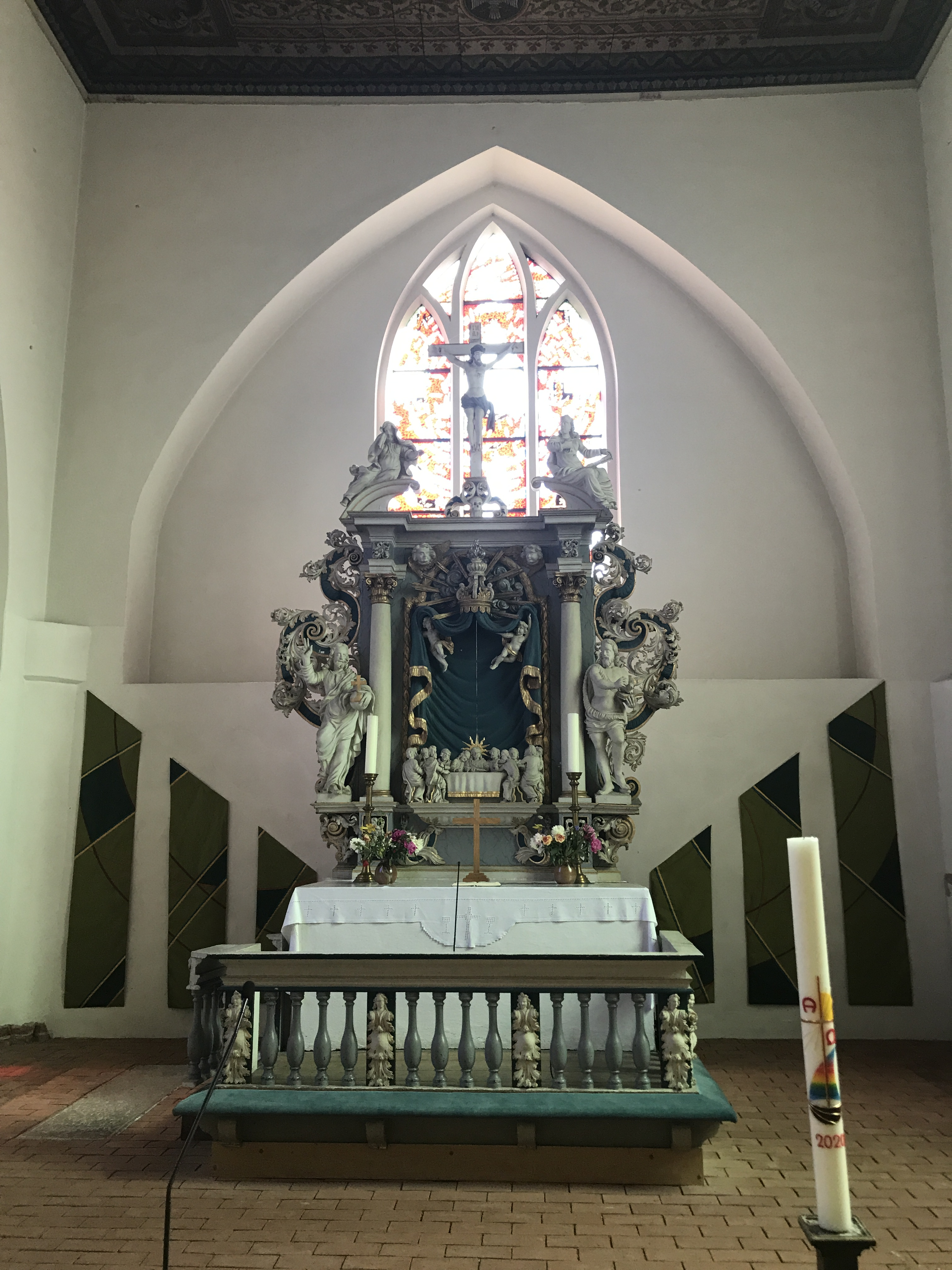 St.-Bartholomäus-Kirche in Ribnitz-Damgarten in Mecklenburg-Vorpommern